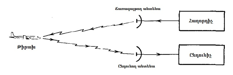 Ռադարի աշխատանքի պարզագույն նկարագրություն